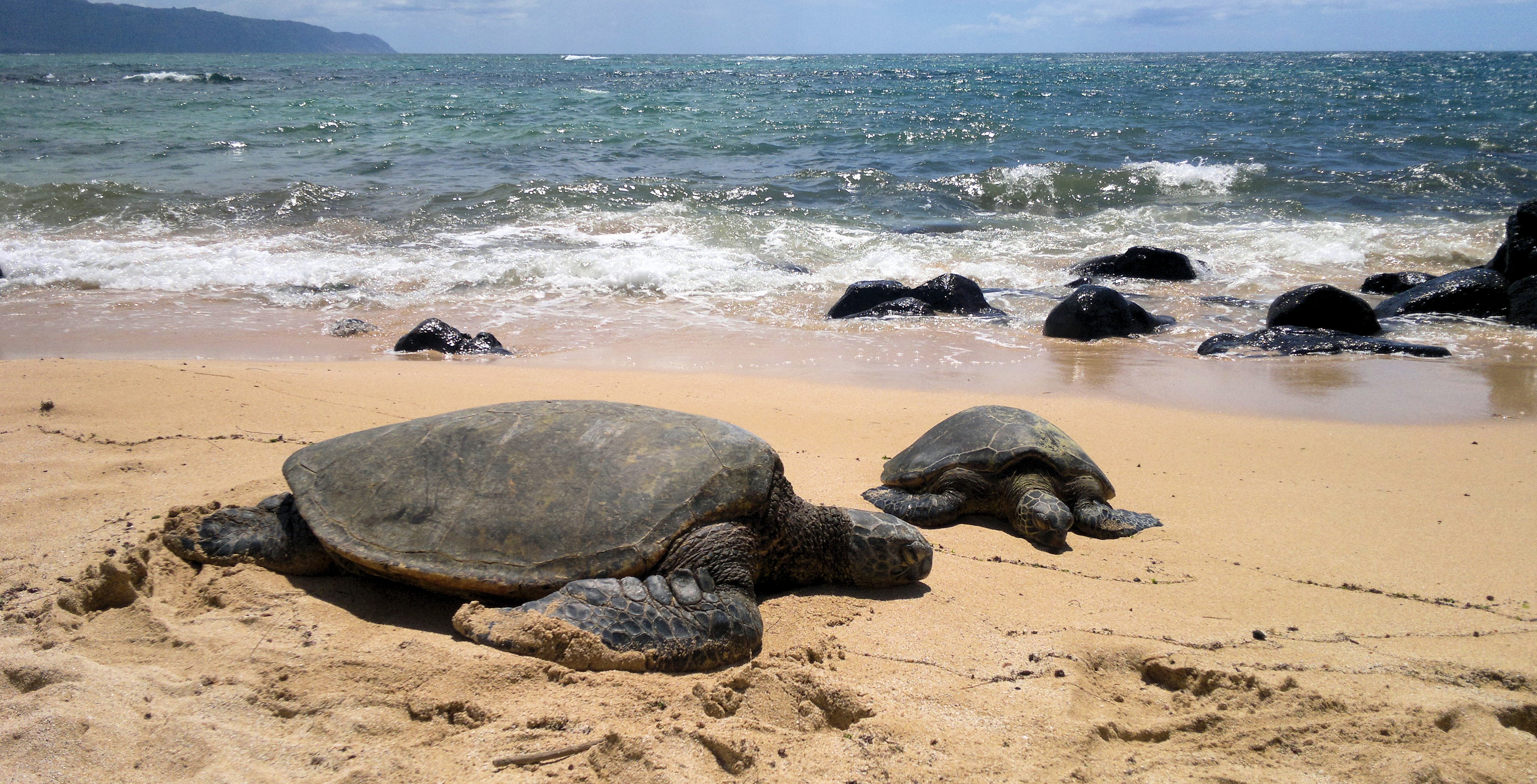 Meeresschildkröten sonnen sich auf der Hawaii-Insel Oahu